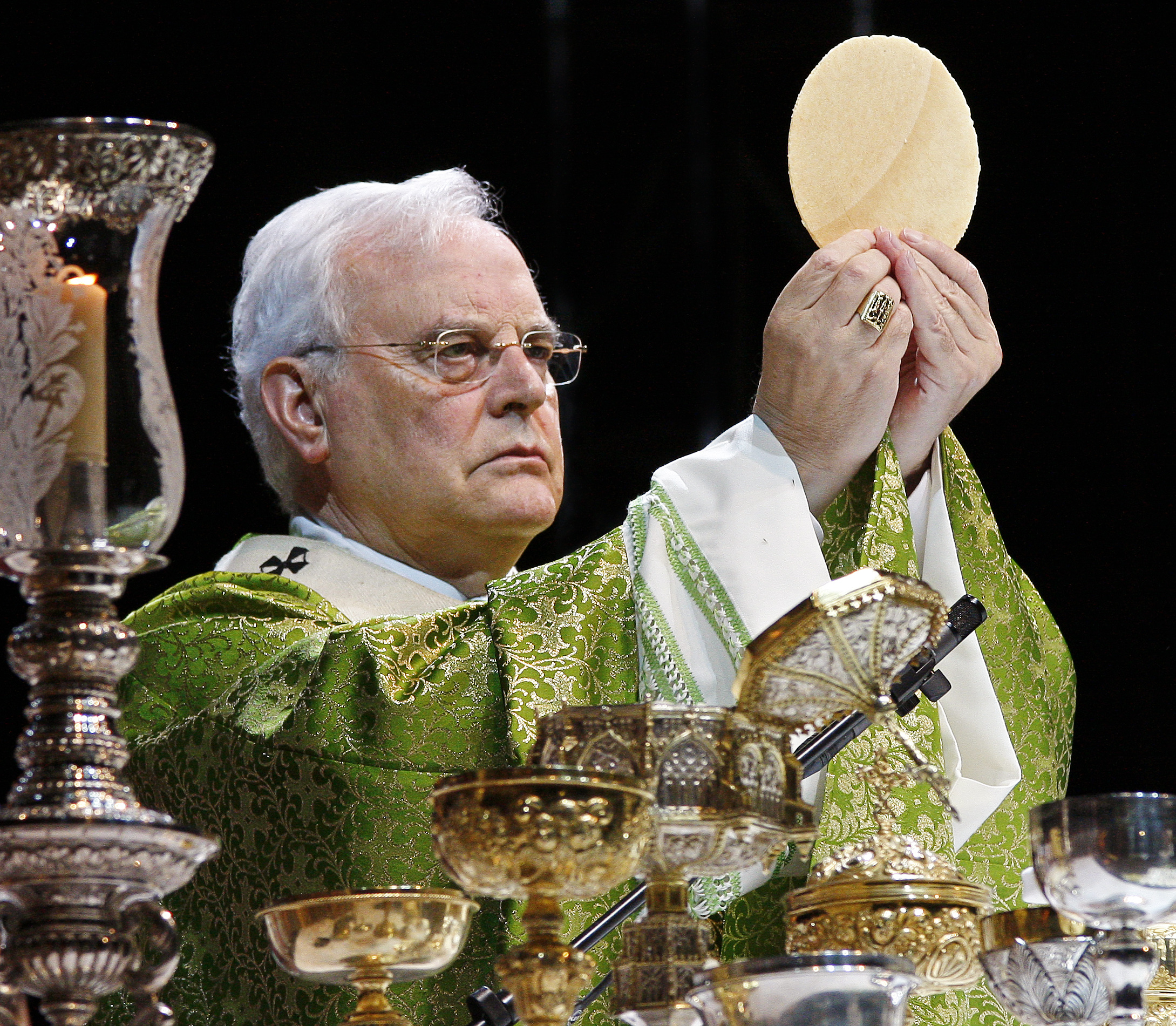 Monseñor Carlos Amigo Vallejo, Cardenal, Arzobispo de Sevilla.